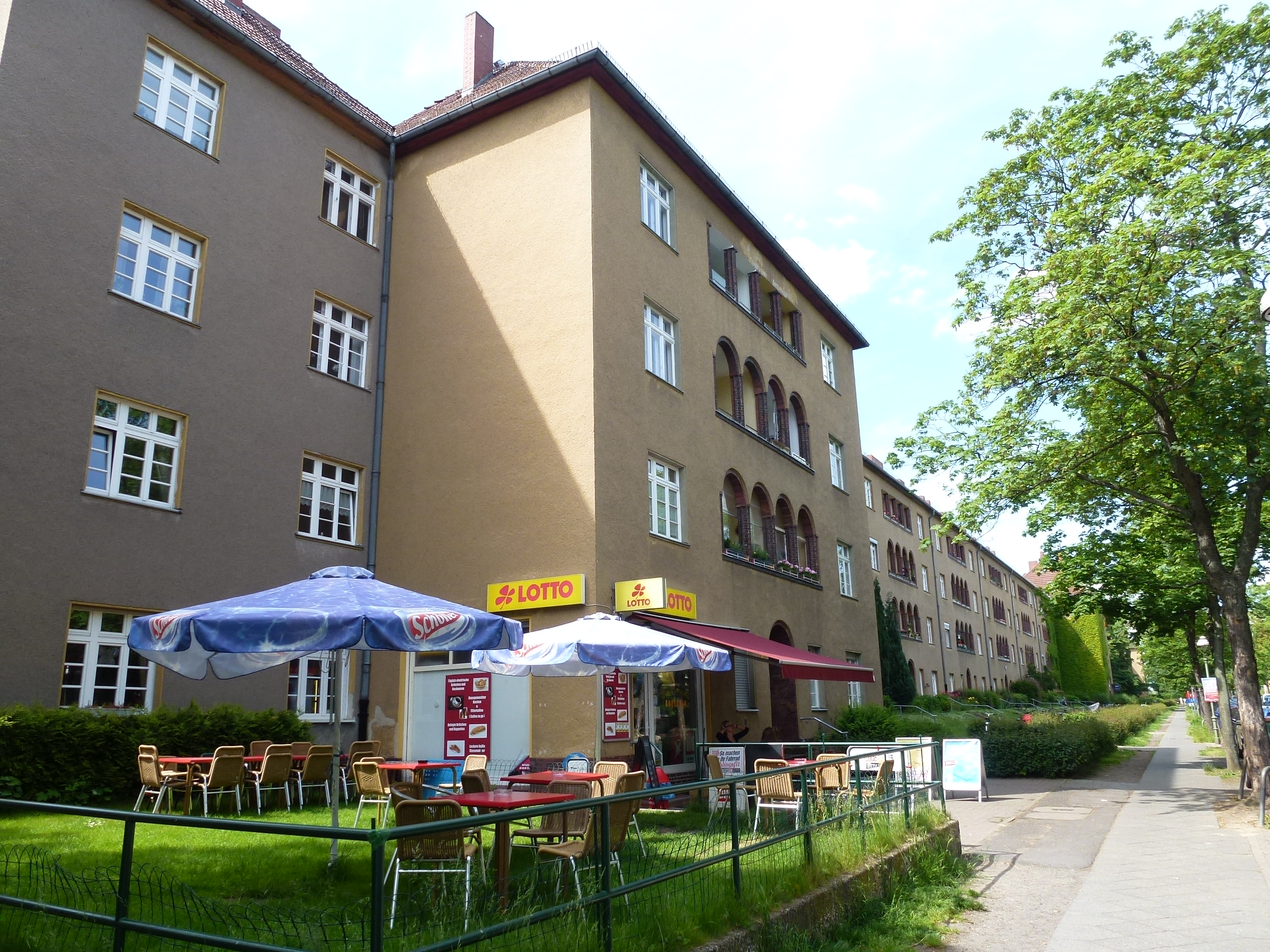 Berlin-Tempelhof Gontermannstraße